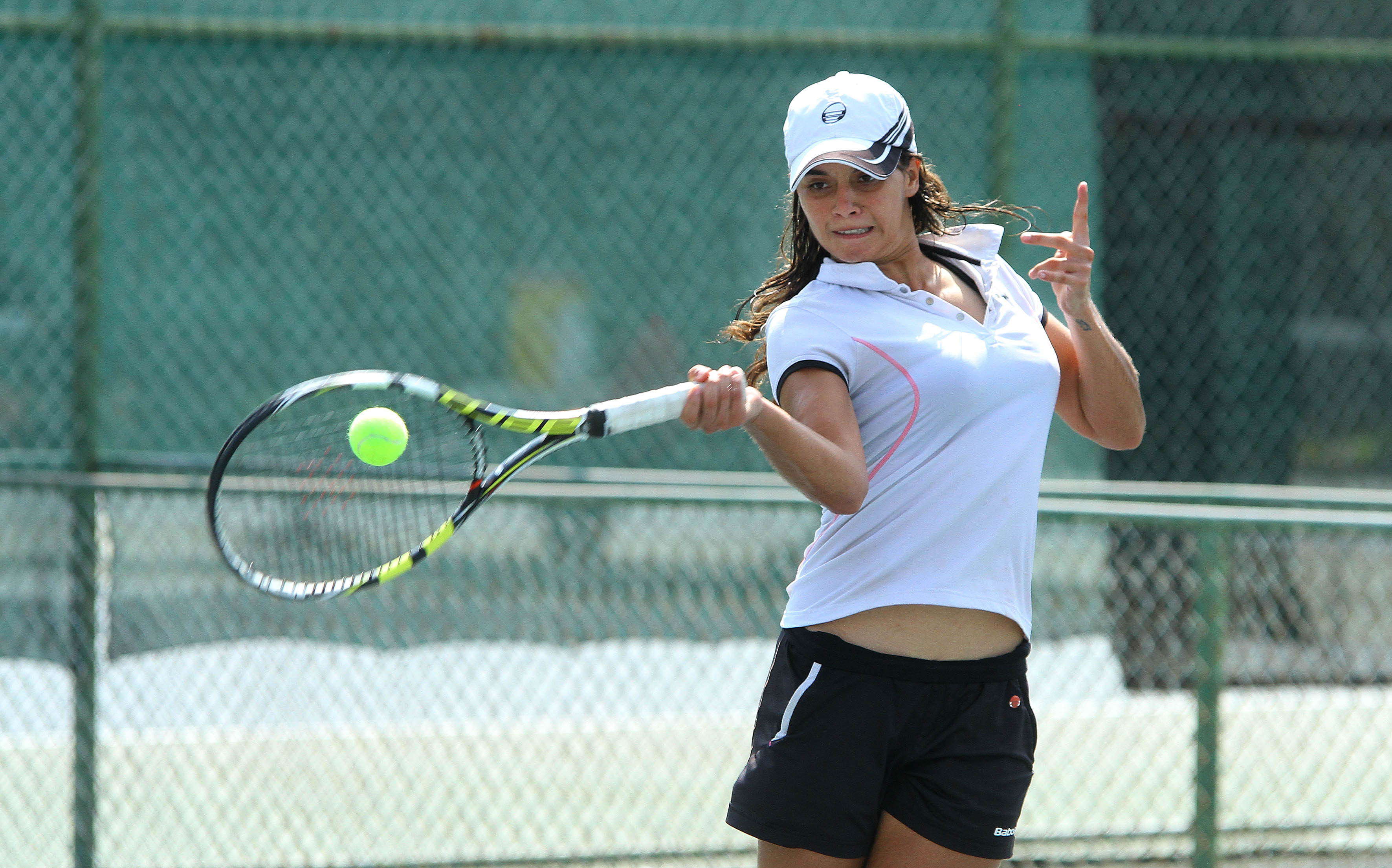 Guayaquil, 19 de jun del 2015 (Andes).-La tenista Doménica González, integra el equipo del Grupo II de la zona americana de la Fed Cup por BNP Paribas a disputarse en República Dominicana Foto:César Muñoz/Andes